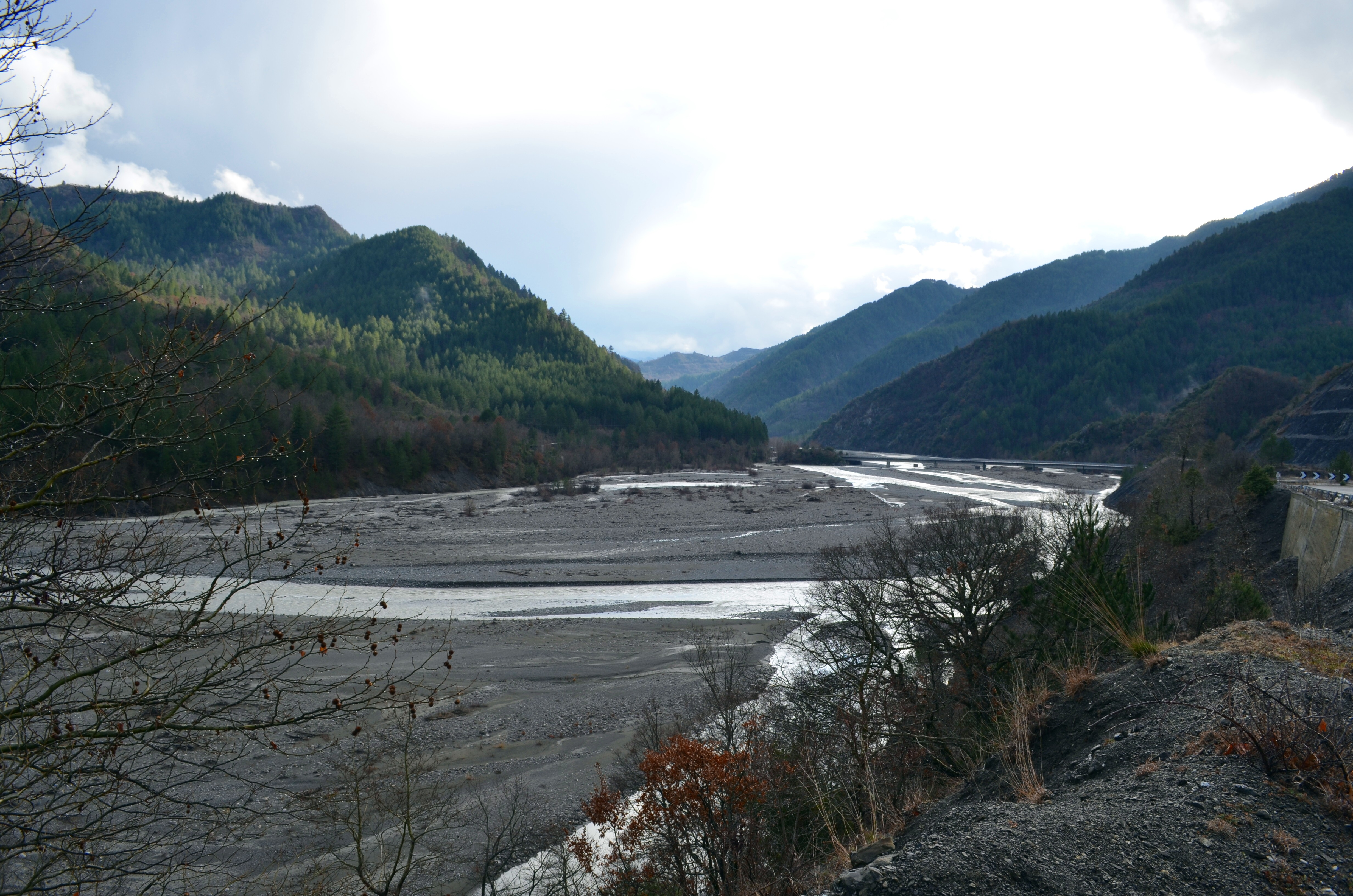 Sarantaporos river near Pyrsogianni, Ioannina, Greece